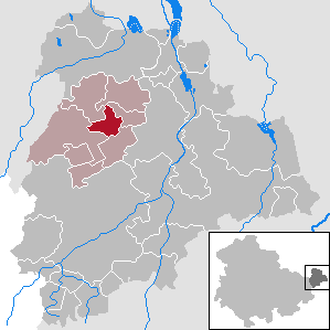 Monstab in Thuringia - District Altenburger Land